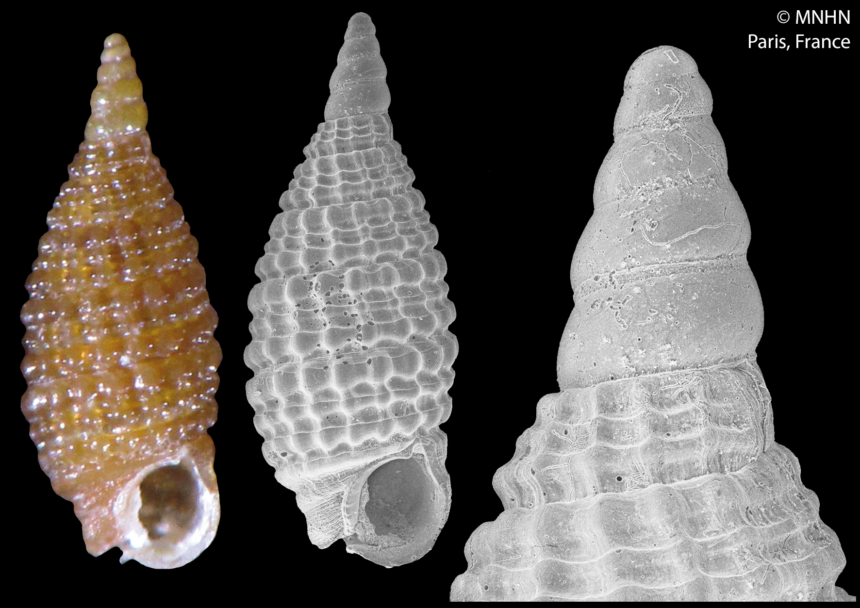 PRESERVED_SPECIMEN; Joculator variabilis Cecalupo & Perugia, 2012; Type status: N/A; Identified by: Cecalupo A. & Perugia I.; Individual count: 1; Event date: 2014-06-18T00:00:00Z